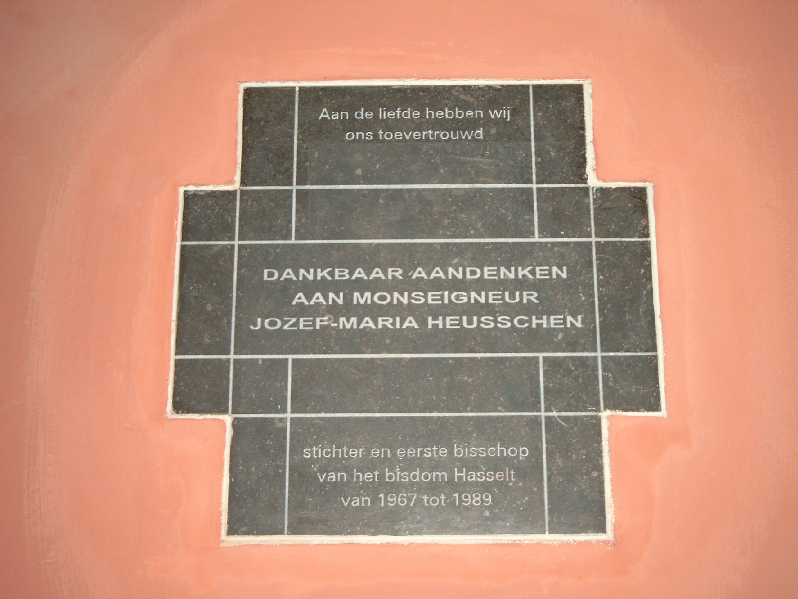 Gedenkteken voor Monseigneur Jozef-Maria Heusschen in de Sint-Quintinuskathedraal te Hasselt